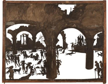 Ailleurs, 1891, Théâtre d'ombres, Henri Rivière, Plaque de zinc montée sur bois - Coll. Le Vieux Montmartre / Musée de Montmartre